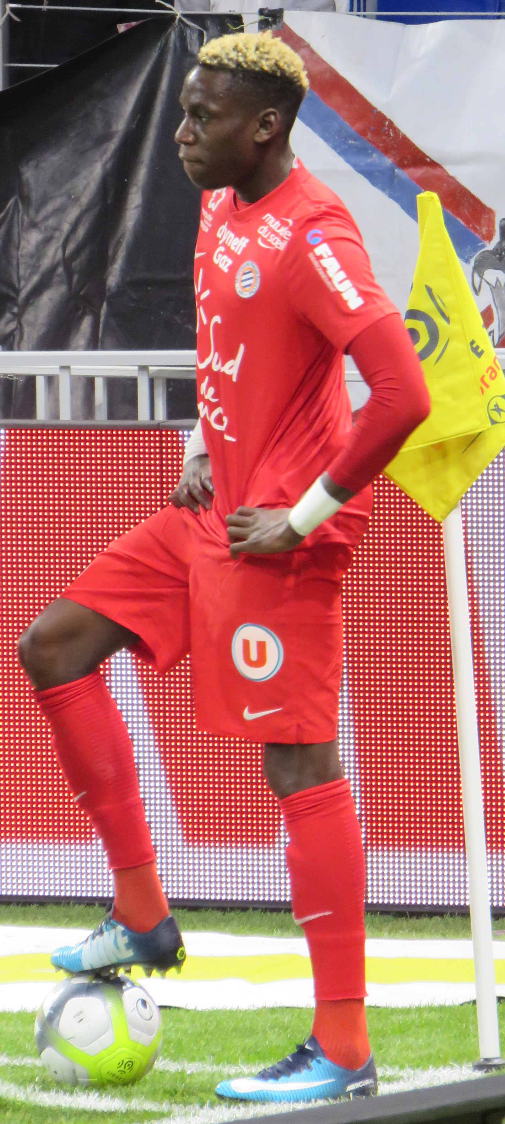 Junior Sambia lors du match Lyon-Montpellier (Ligue 1), attendant pour tirer un corner.